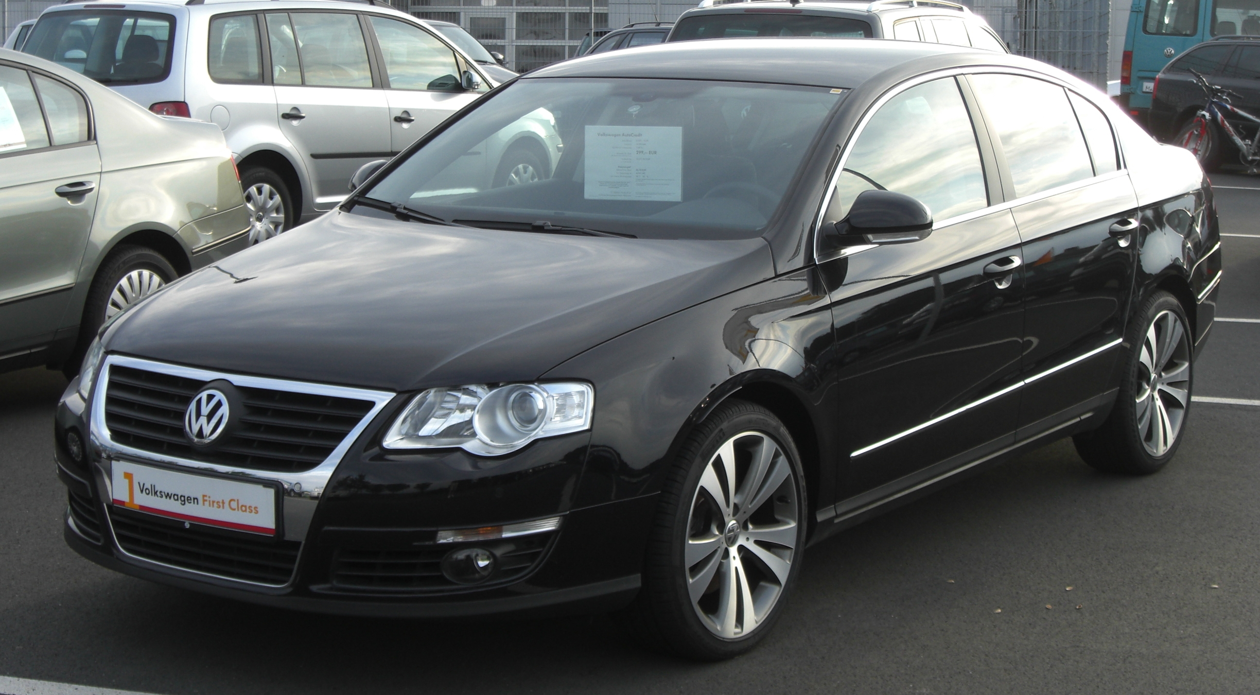 VW Passat